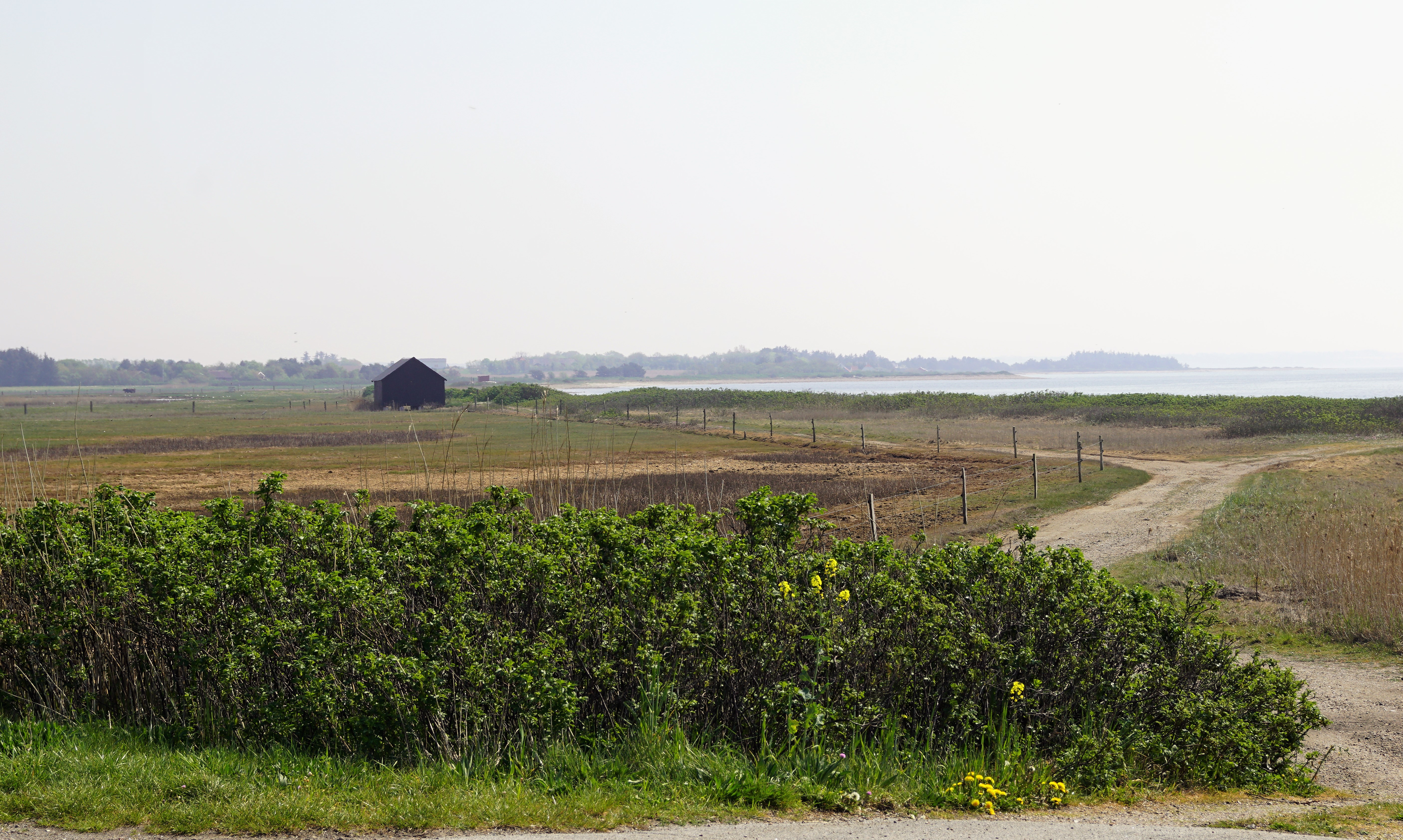 Jegindø strandeng på vestsiden af øen